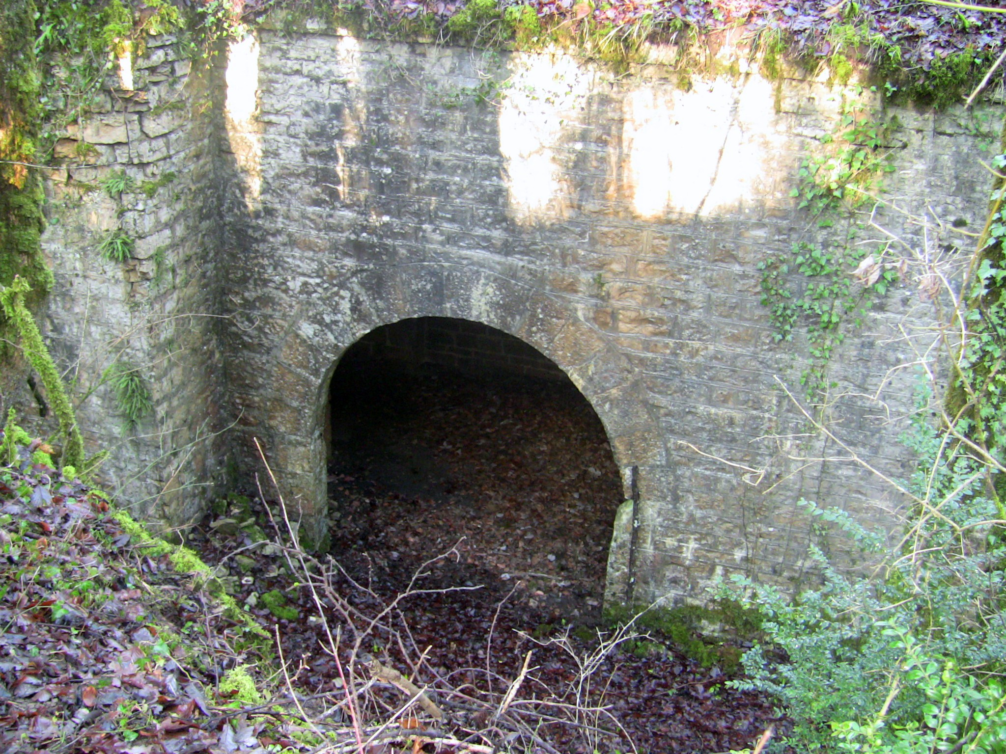 L'entrée de la caserne annexe sud-ouest du fort de Planoise, à Besançon (Doubs, France).